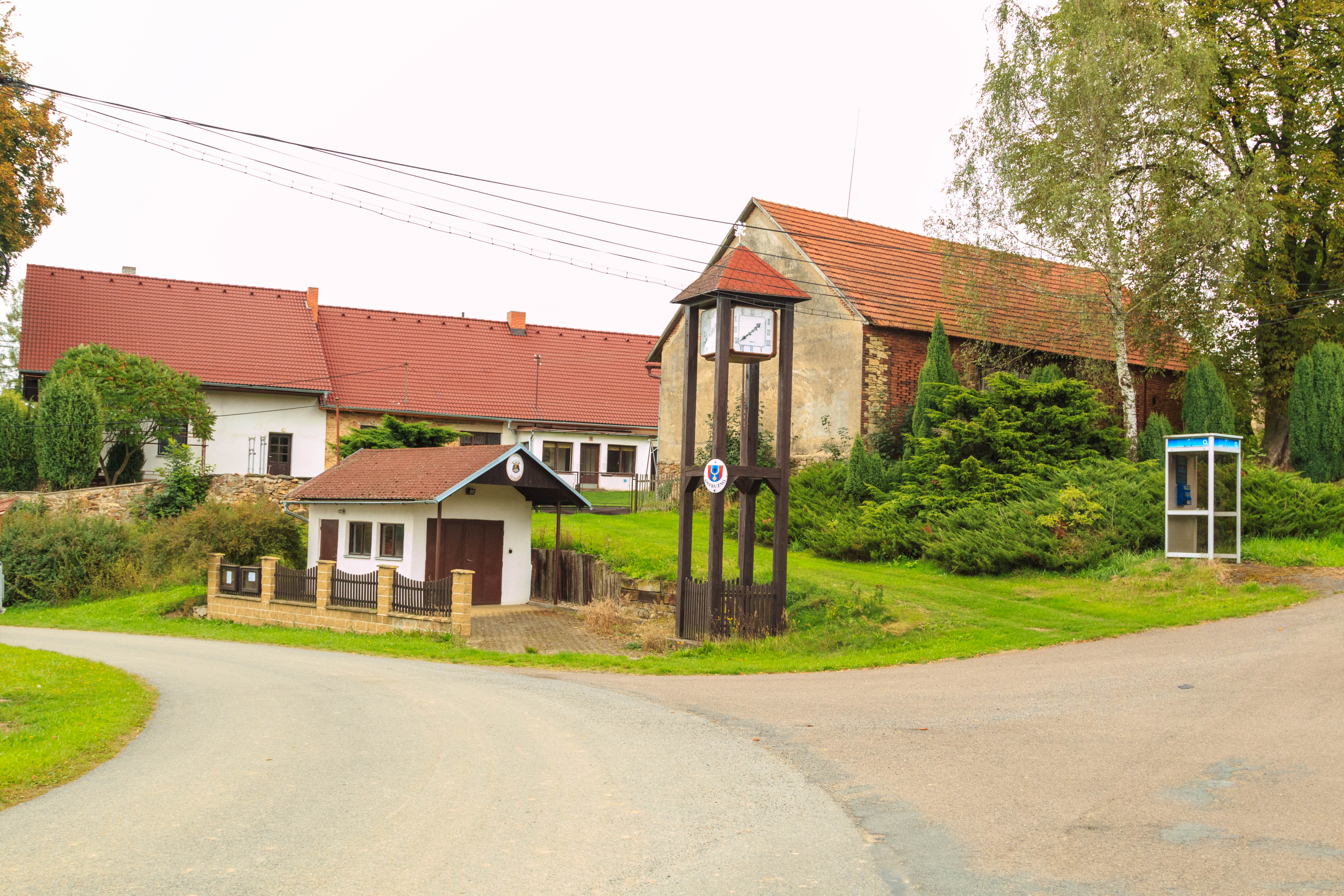 Ostružno návesní hodiny